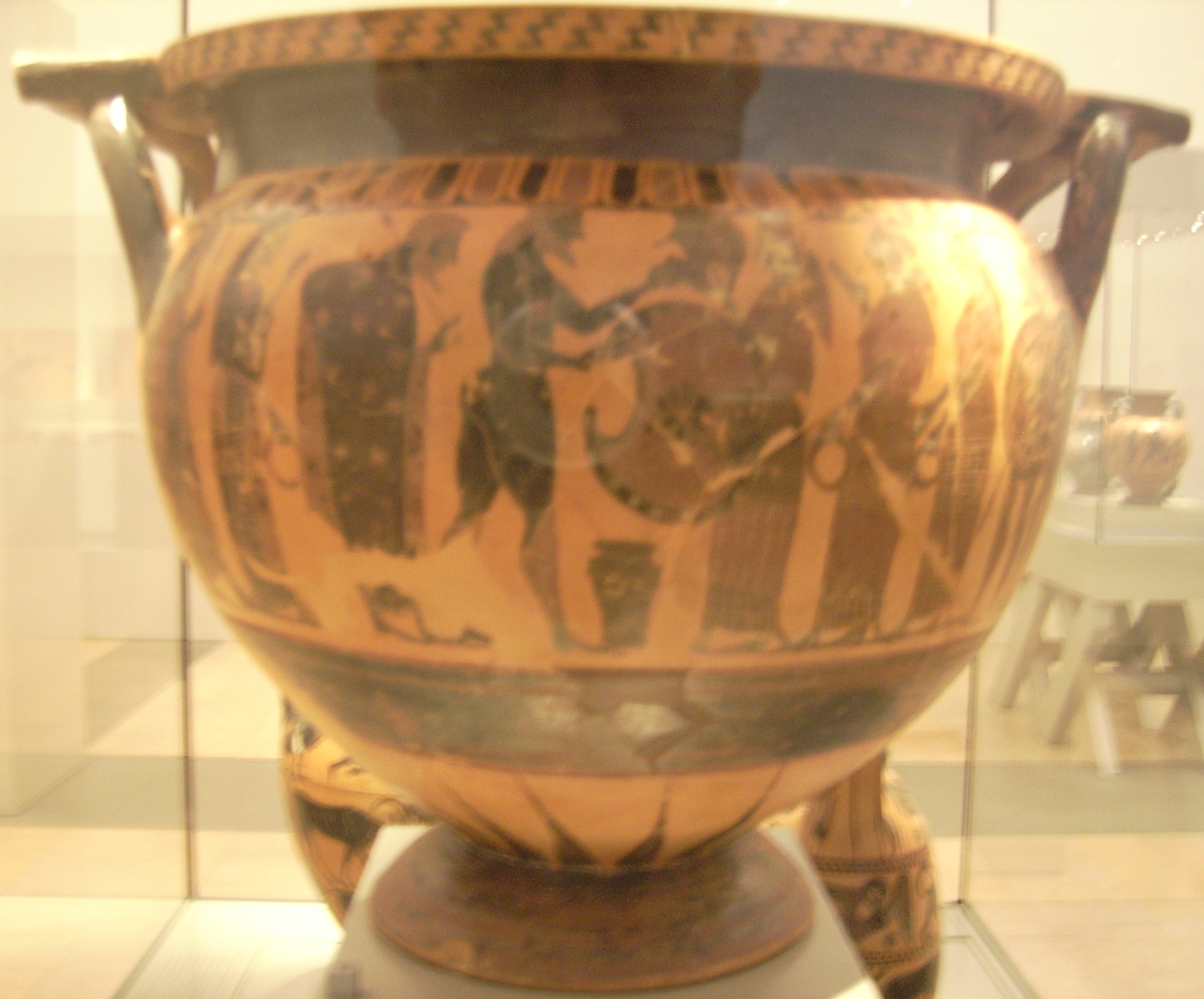 Antikensammlung Berlin/Altes Museum